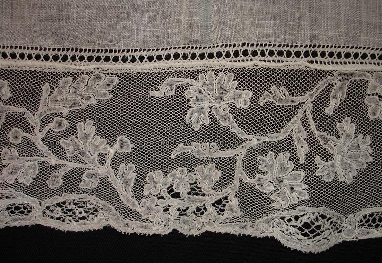 Mechlin Lace